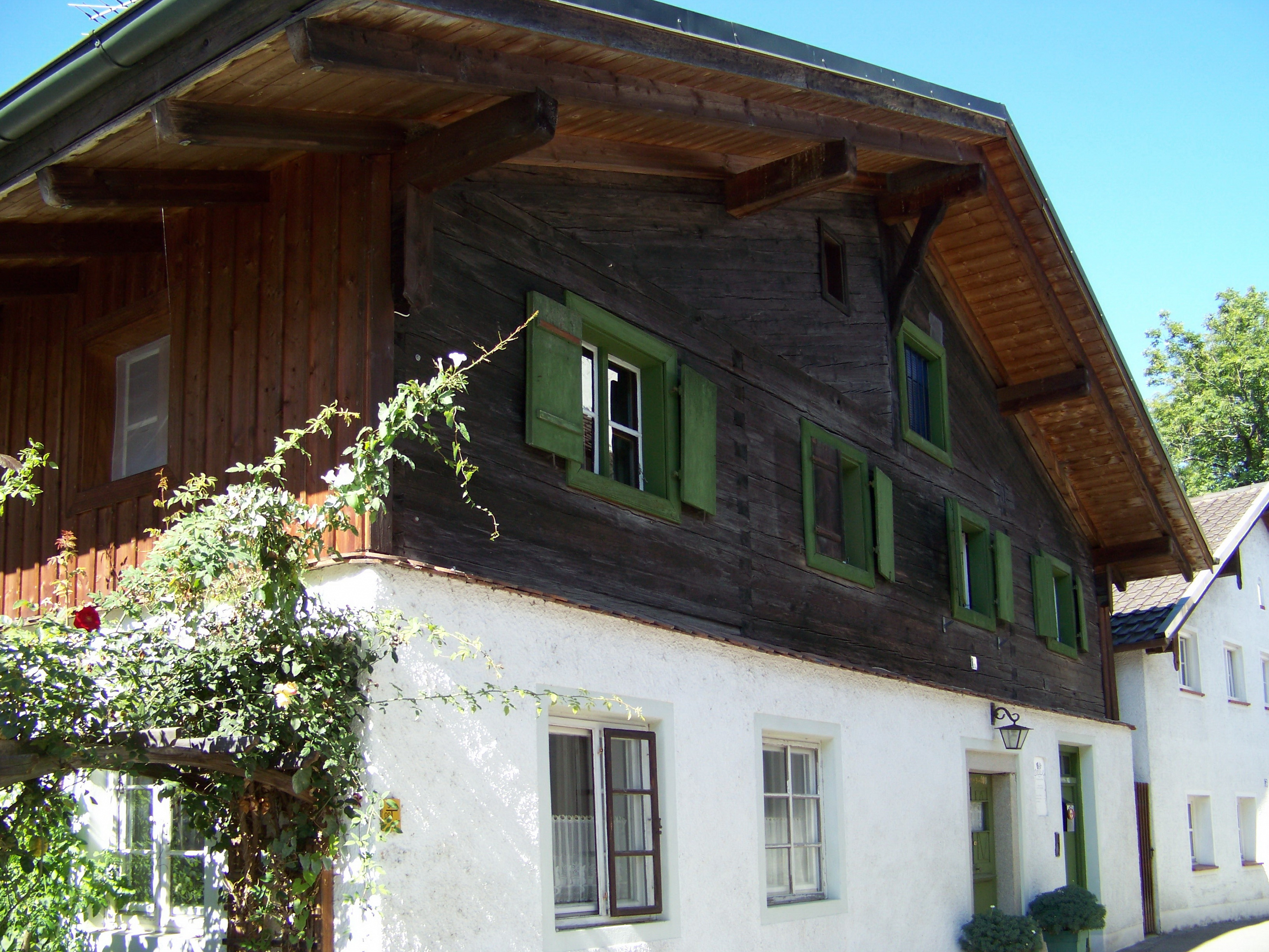 Bogen, Bachststraße 19. Giebelhaus, Obergeschoss-Blockbau mit Flachsatteldach, im Gebälk bez. "1725", Haustür bez. 1840. Ehemalige Fronfeste.